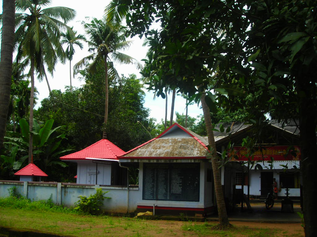 Ayyappa Temple, Chamakunnu